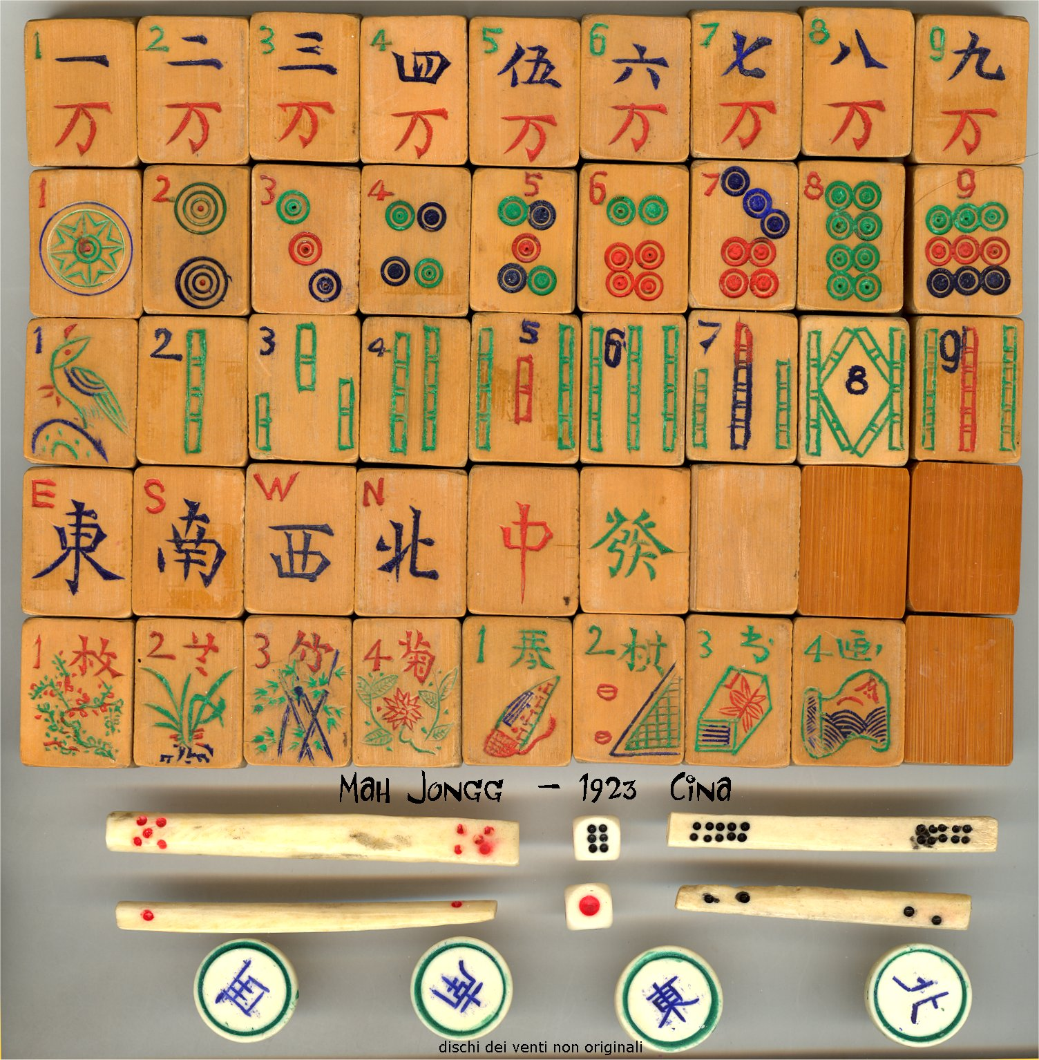 Gioco del Mah-Jongg datato 1923 - pedine di bamboo, fiches di osso, dadi di psso, dischi dei venti non originali (quelli originali erano in osso)